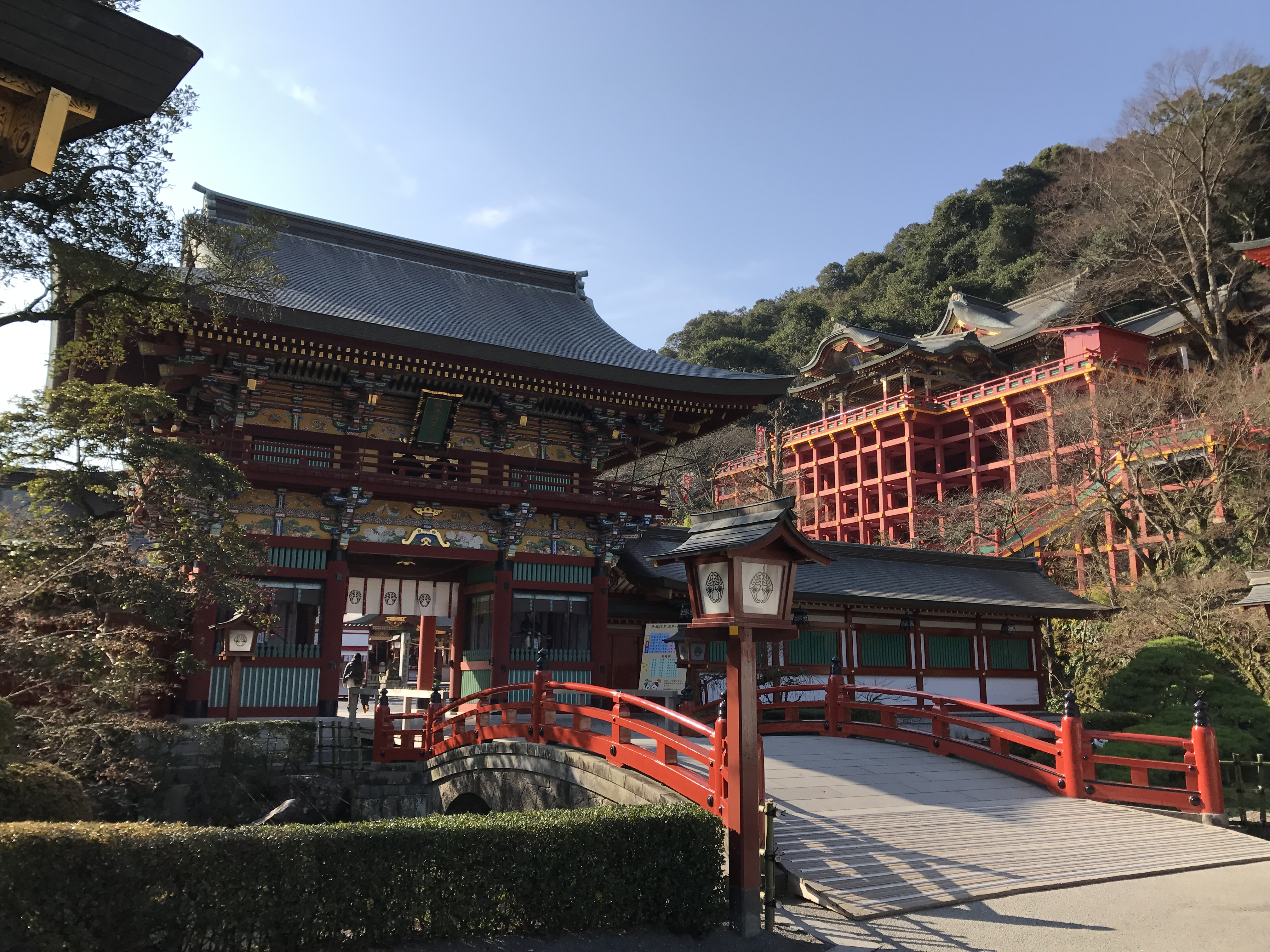 祐徳稲荷神社の太鼓橋、楼門と本殿